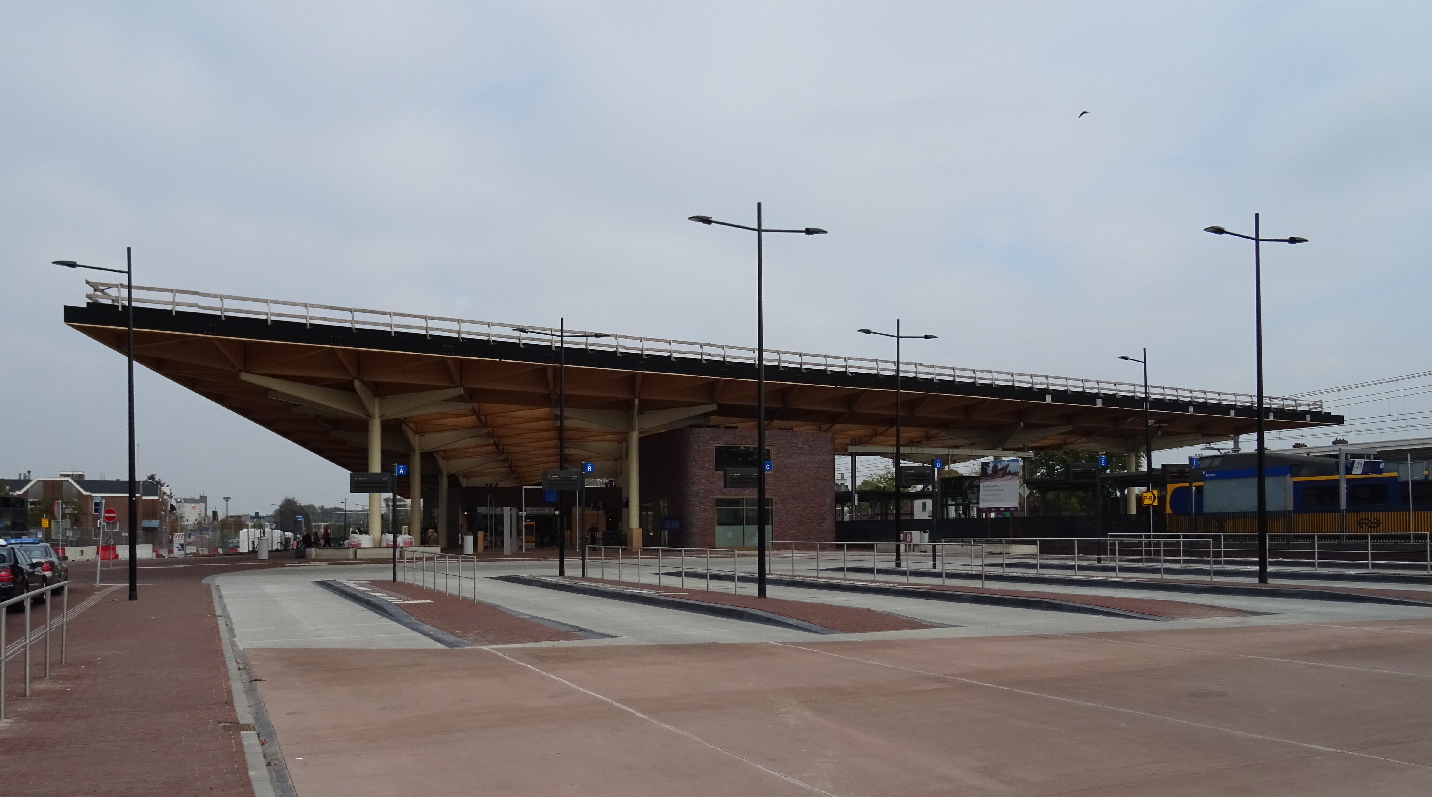 Assen station oktober 2018